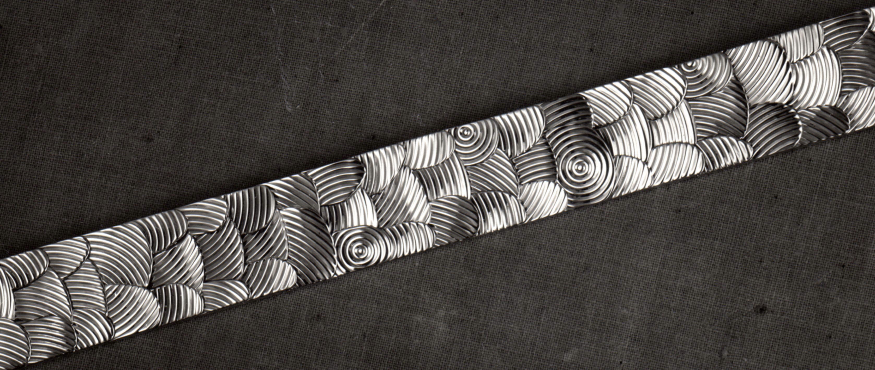 Bracciale in oro inciso con la tecnica guilloché, realizzato nel distretto orafo di Valenza IT